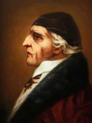 Alferaki Dmitrii Ilyich (1734-1830)